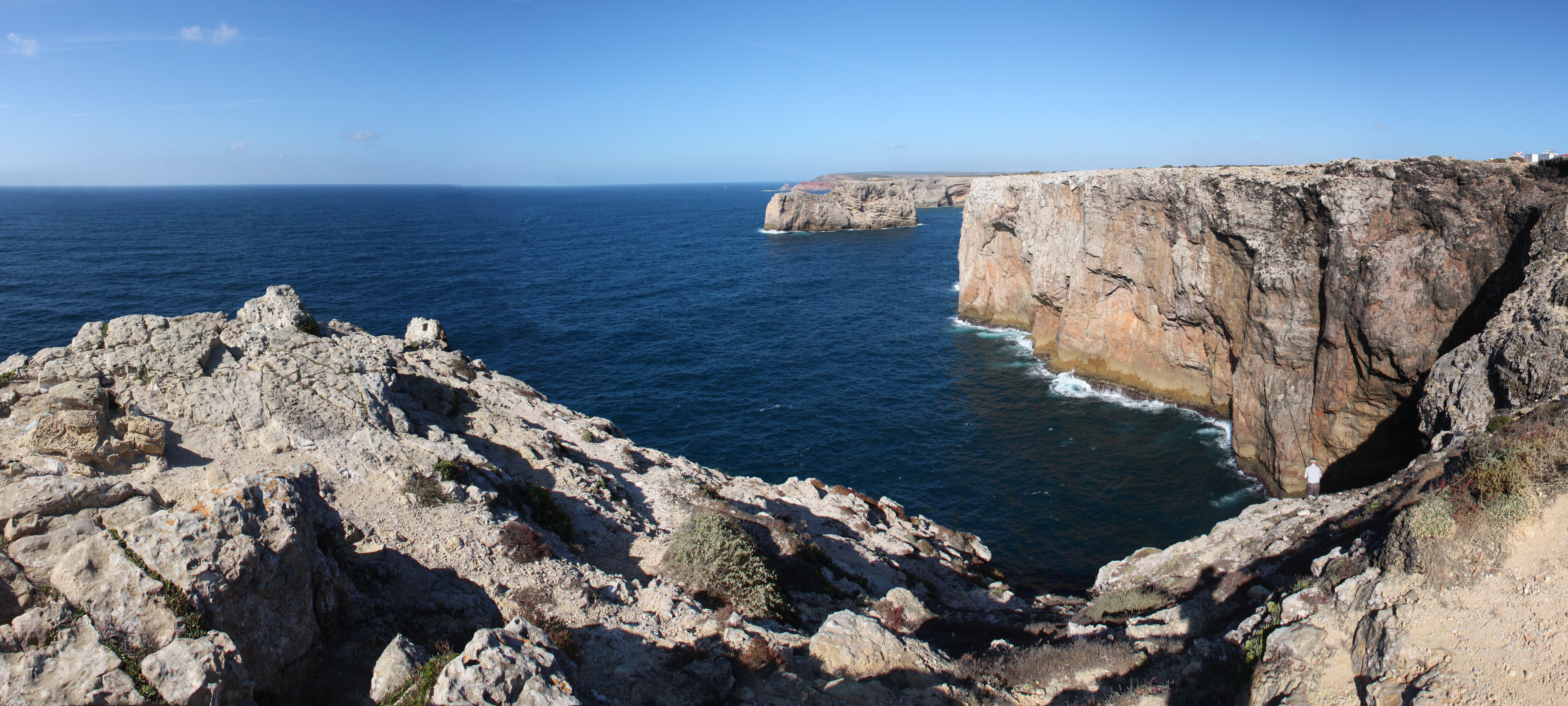 Steilküste bei Sagres, dem südwestlichsten Punkt Europas, Cabo de São Vicente